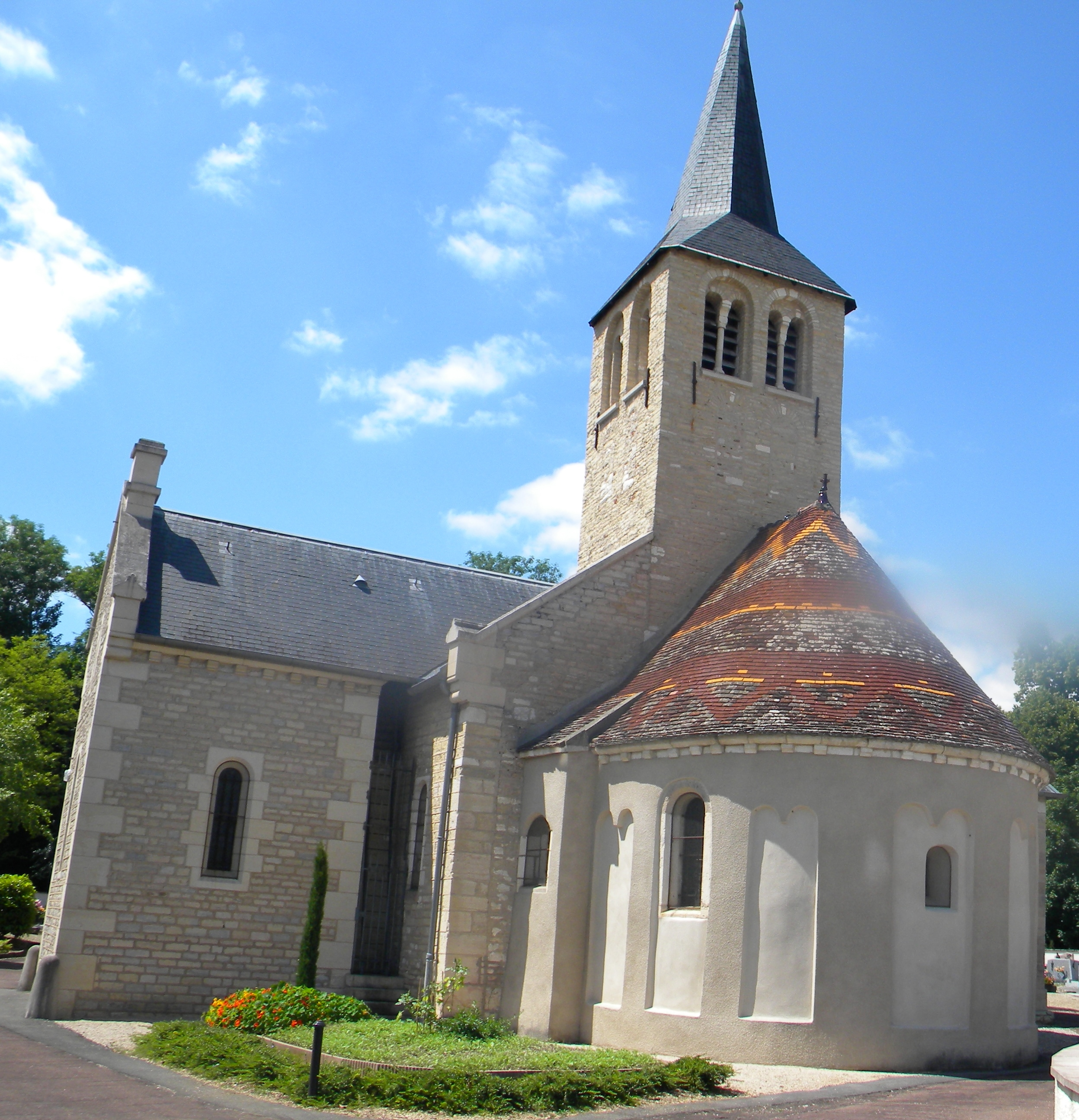 Bretenière